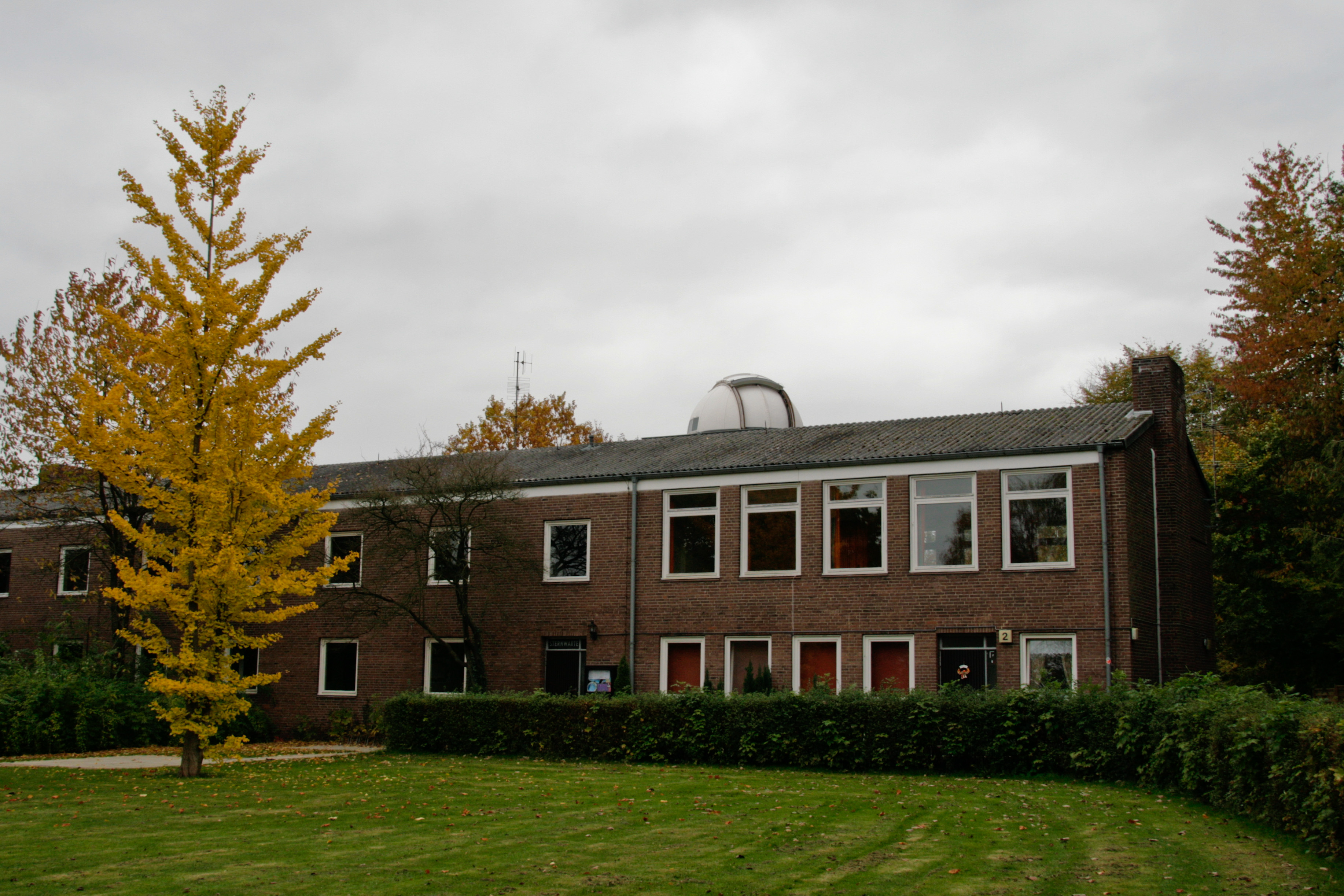 Sternwarte Lübeck im Herbst